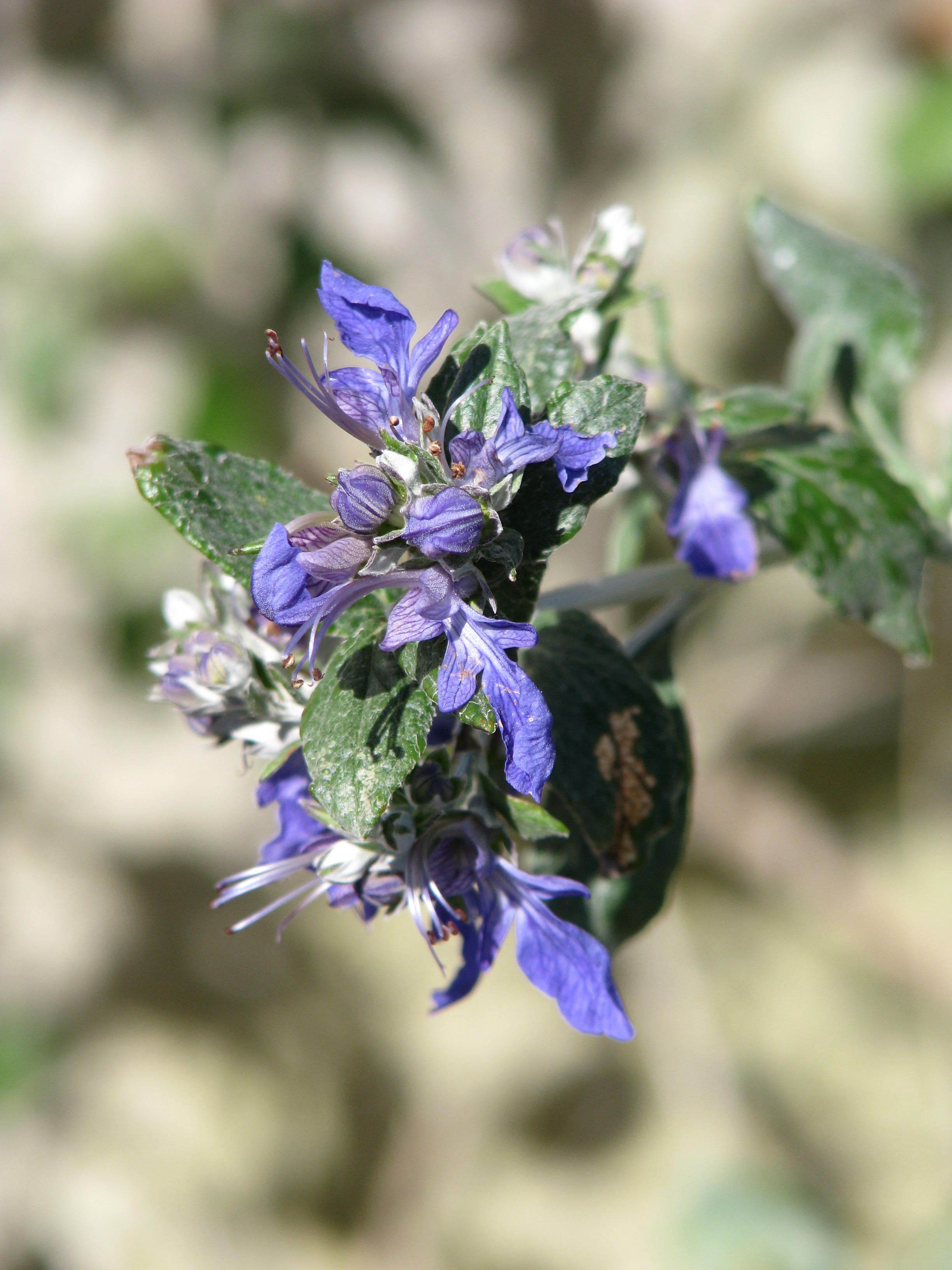 Teucrium fruticans Azureum